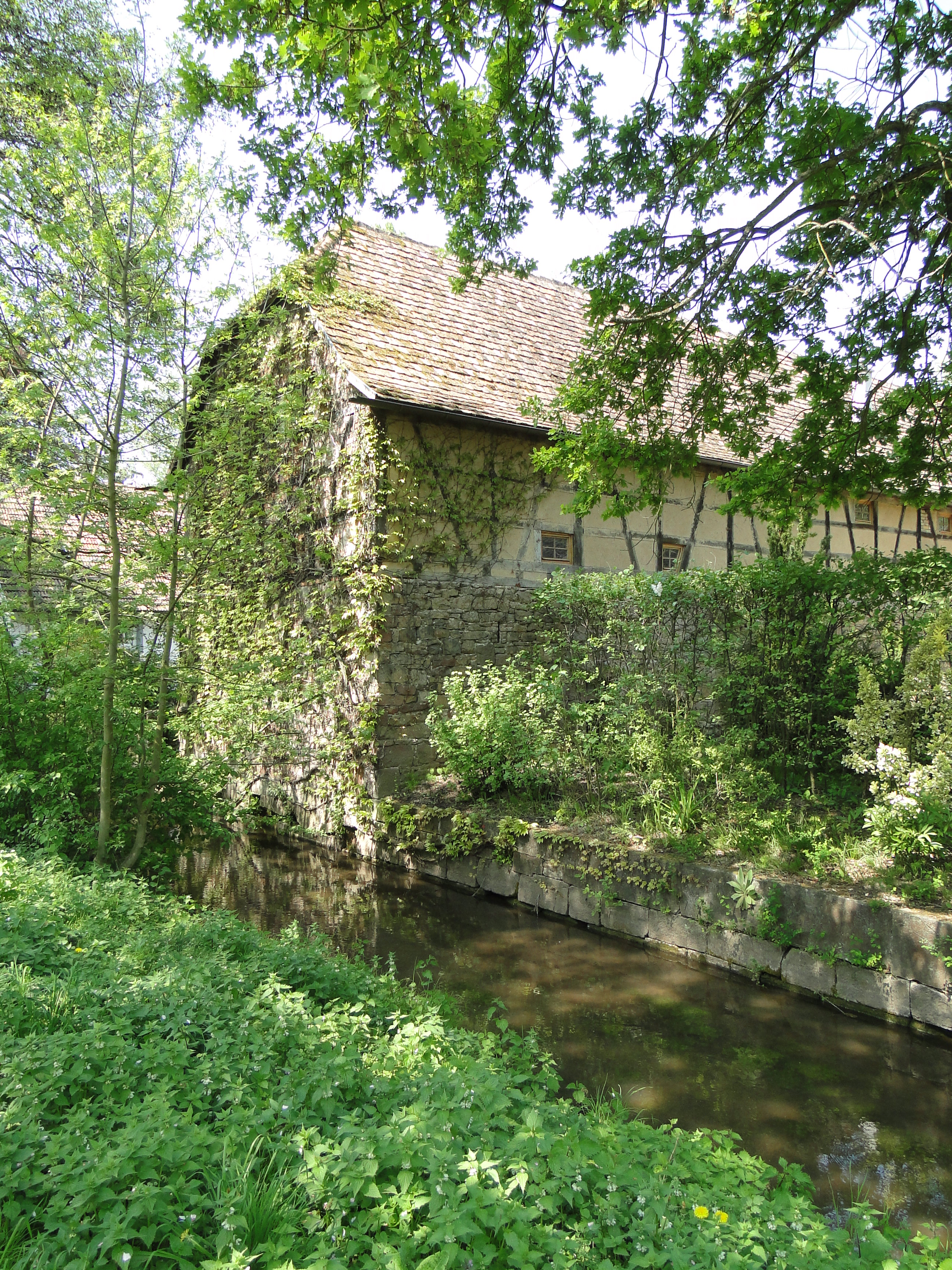 Nördlich des Klingbach gelegenes Wirtschaftsgebäude der Altmühle in Herxheim bei Landau.